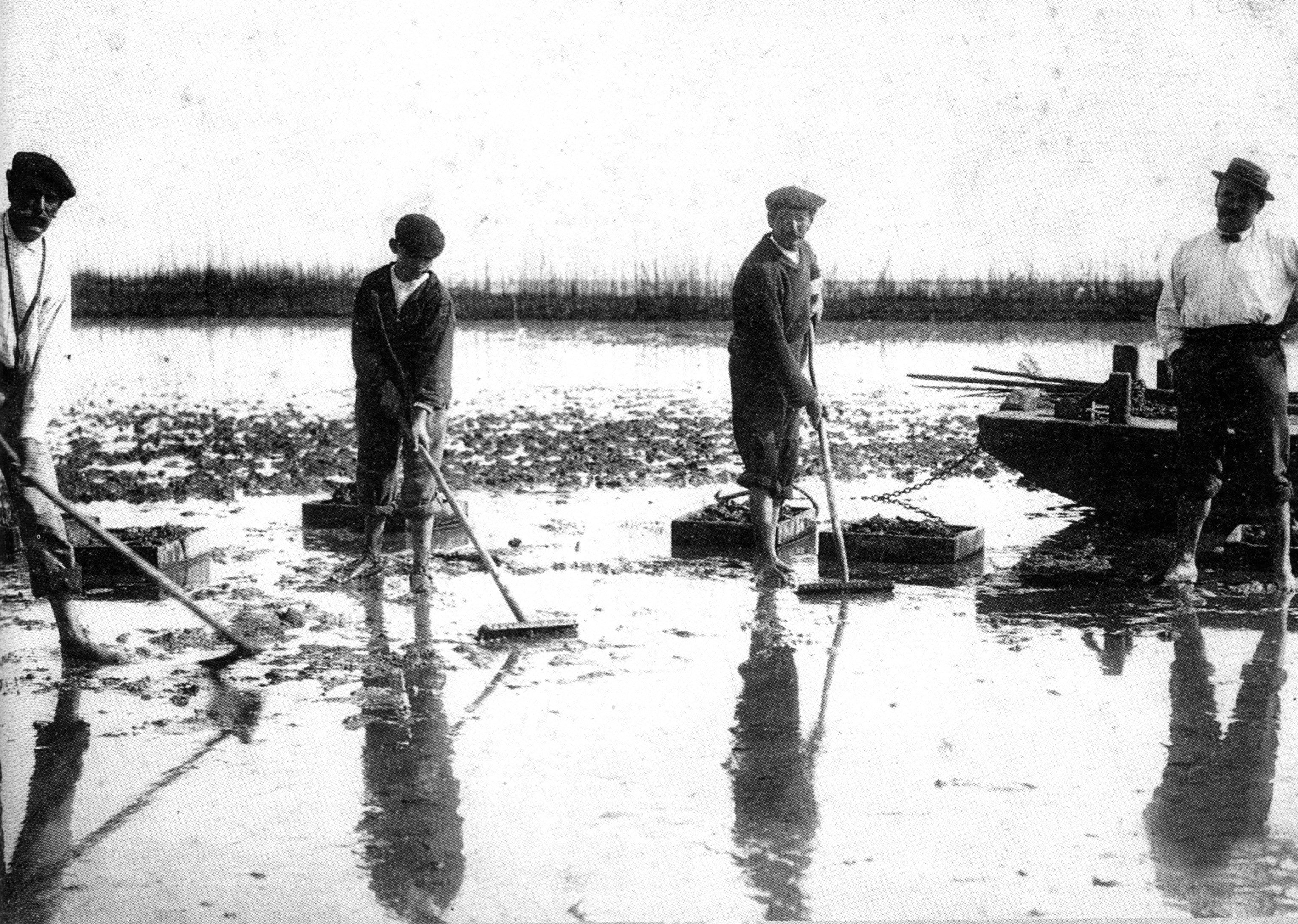 Les débuts de l'ostréiculture sur le Bassin d'Arcachon (Pays de Buch) à la fin du XIXe siècle Copyright Catégorie: Pays de Buch